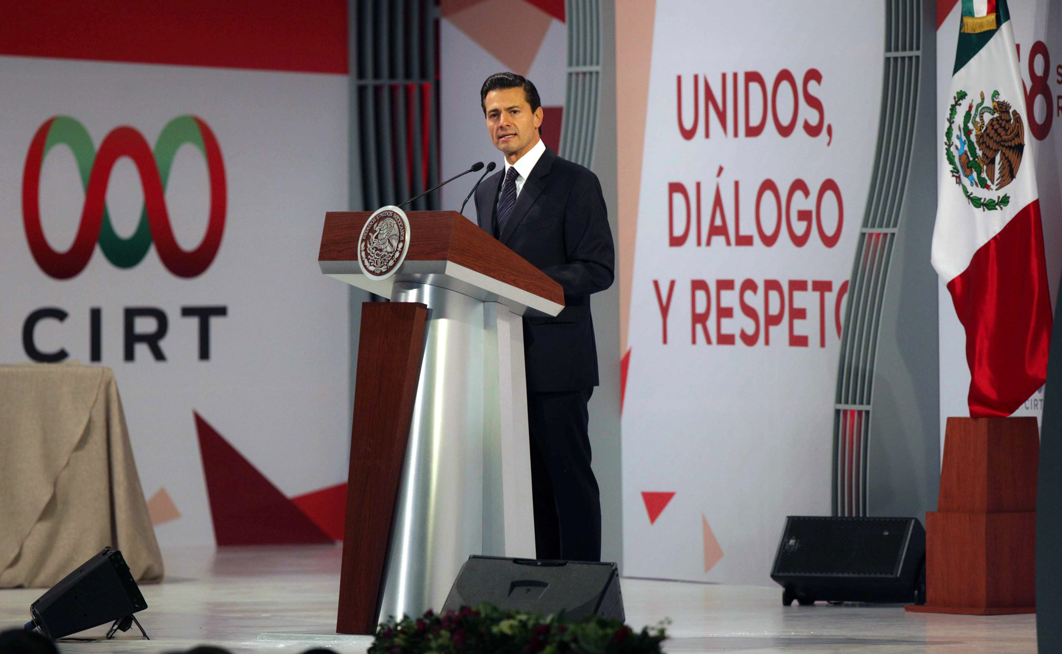 El Presidente Enrique Peña Nieto encabezó la comida de la 58ª Semana Nacional de Radio y Televisión, durante la cual entregó el Premio Antena CIRT a personalidades destacadas en el ámbito.